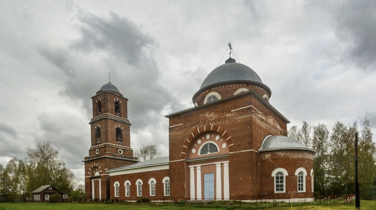 Успенская церковь: Инякино, Шиловский район, Рязанская область